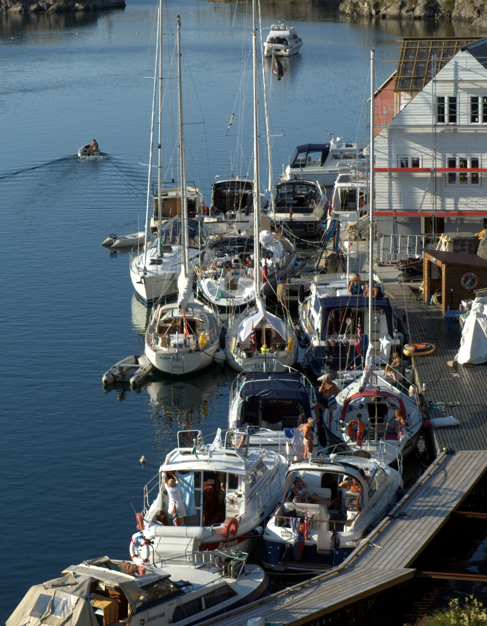 Gjester på Suggevågen, Røvær